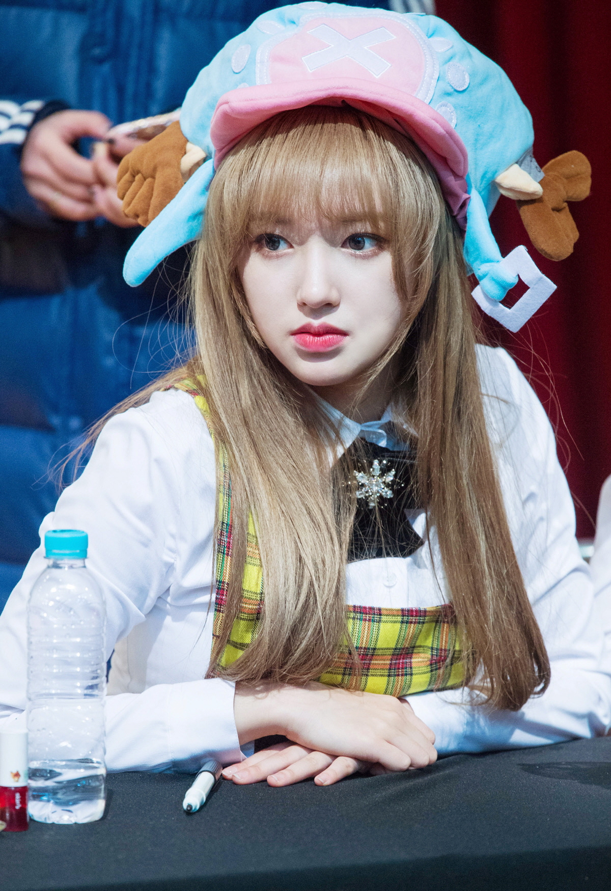 170115 강남팬싸인회 우주소녀 은서 성소 여름